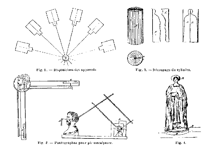 Schéma explicatif de la technique de la photosculpture, illustrant l'article de G. H. Niewenglowski La photosculpture.